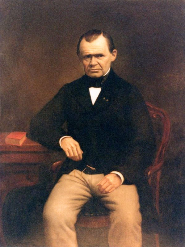 Portret van Hendrik Jan van Heek (1814-1872)